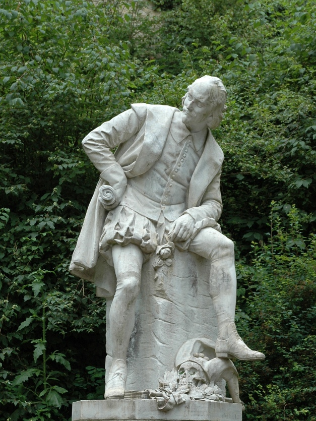 Shakespeare Denkmal von Otto Lessing in Weimar, Sommer 2004